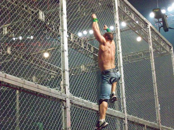 cena